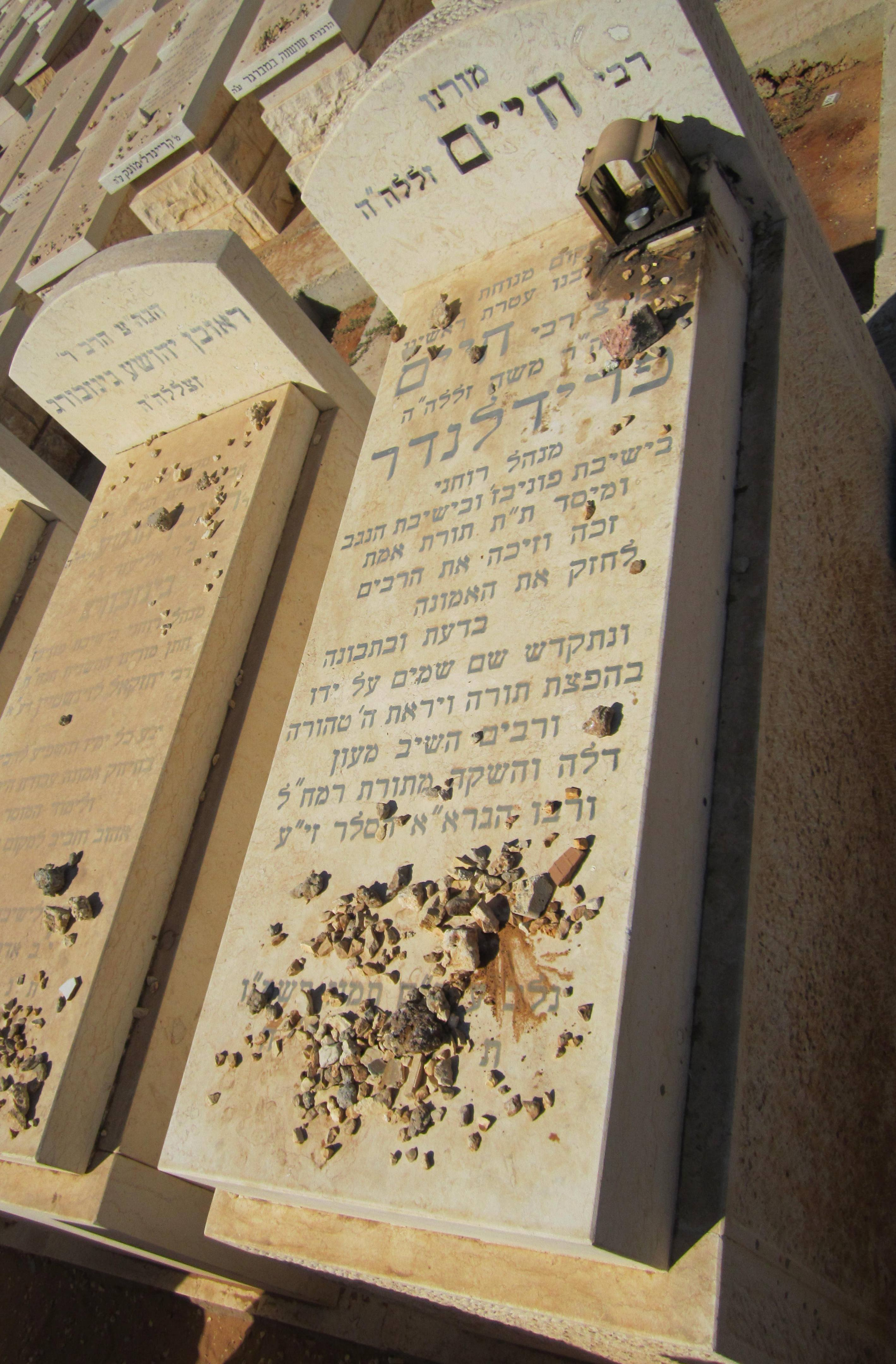 מצבת הרב חיים פרידלנדר